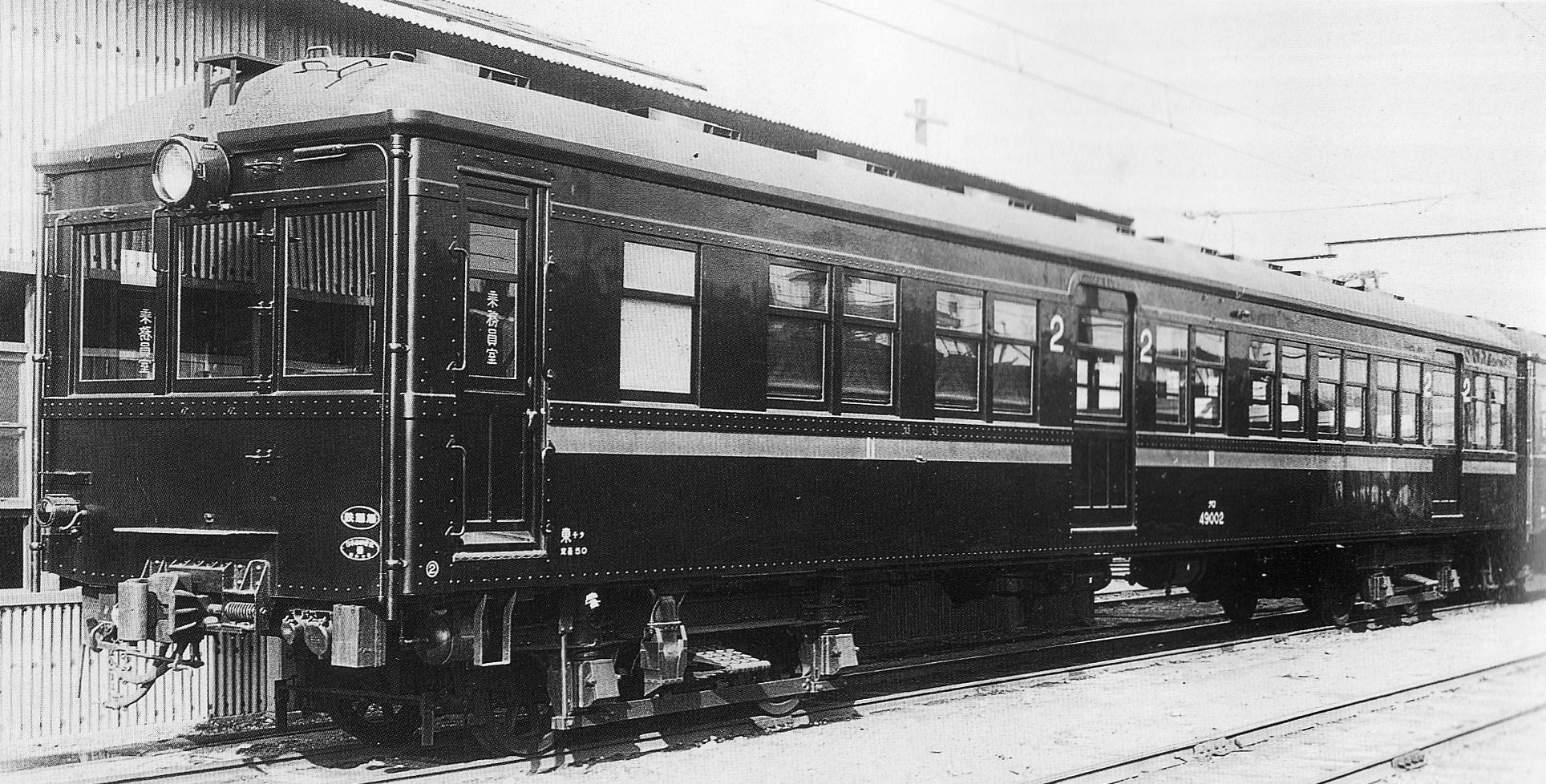 登場間もない頃のクロ49002